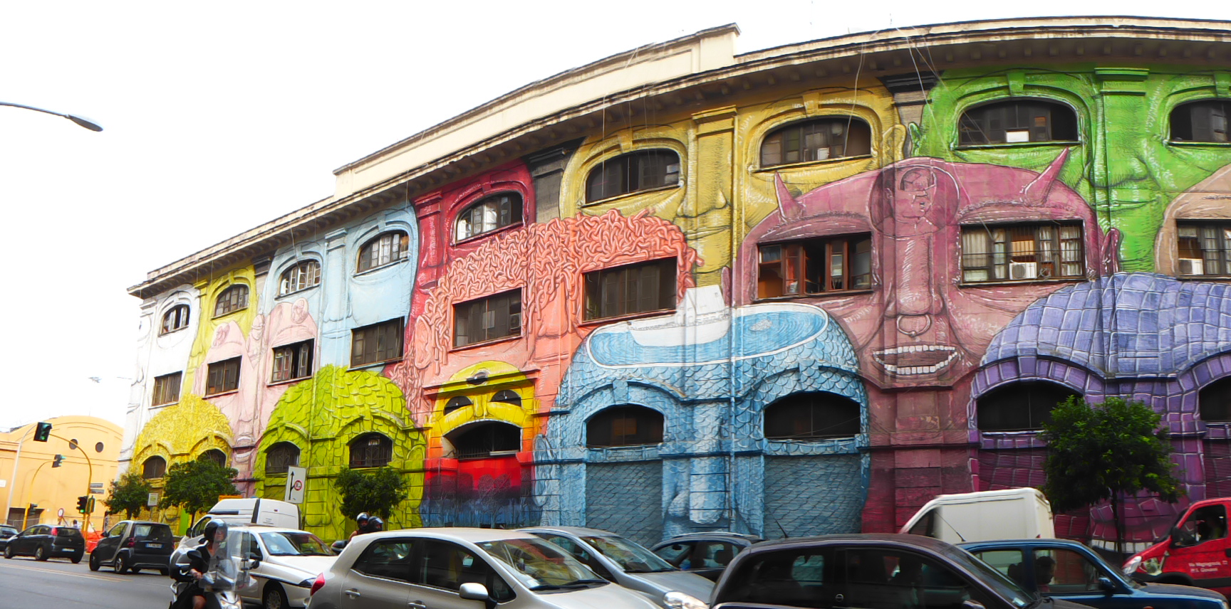 Roma, via del Porto fluviale, ex caserma dell'Aeronautica militare occupata e "muralizzata"